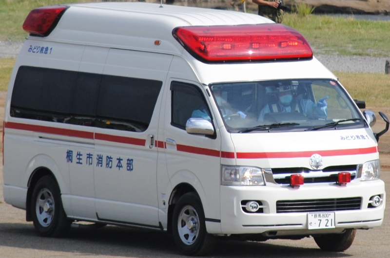 桐生市消防本部の救急車